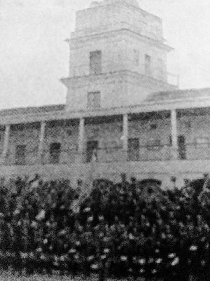 Instituto Nacional para Varones a finales del siglo XIX.